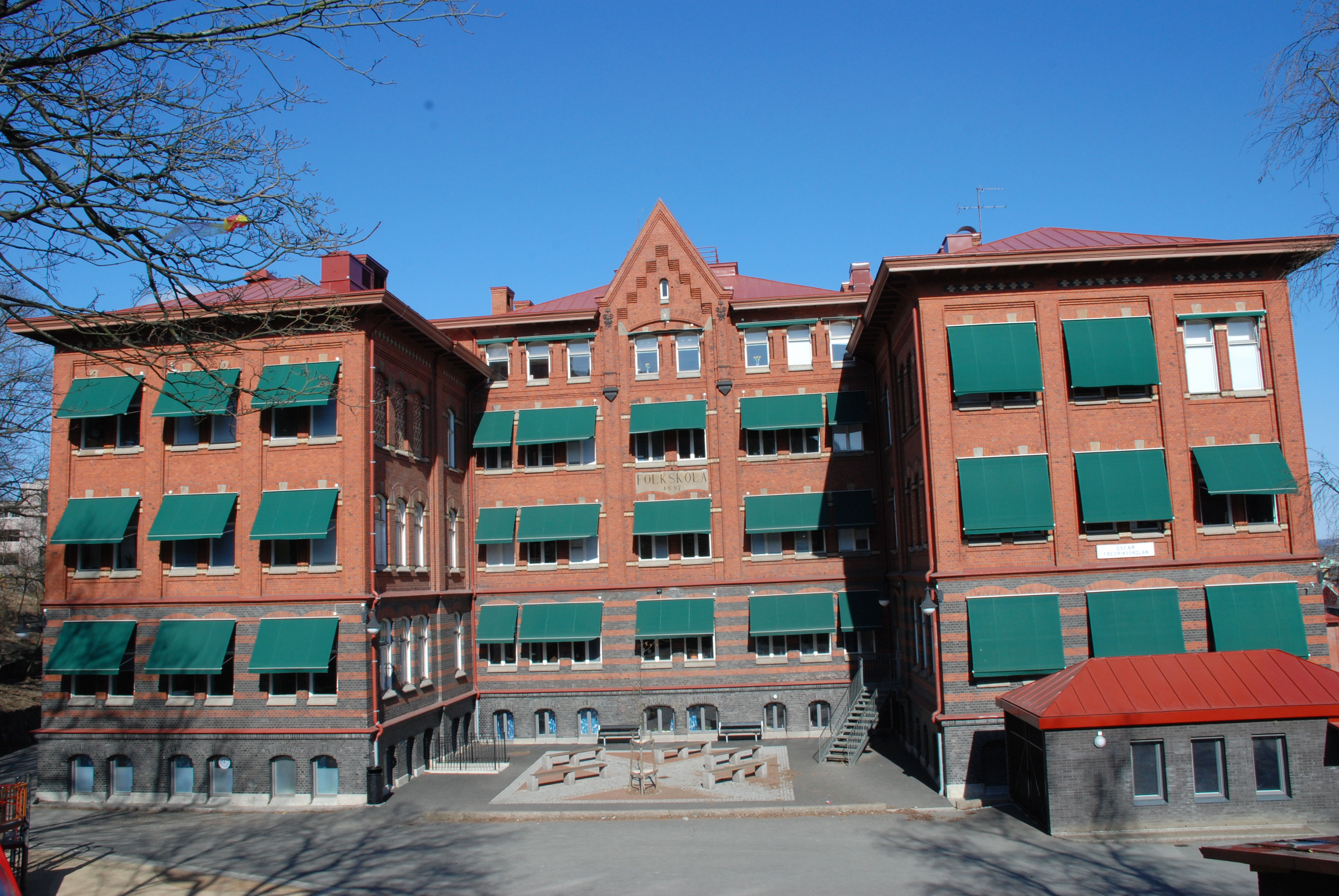 Oscar Fredriksskolan, Oscar Fredriks kyrkogata 5, i Göteborg